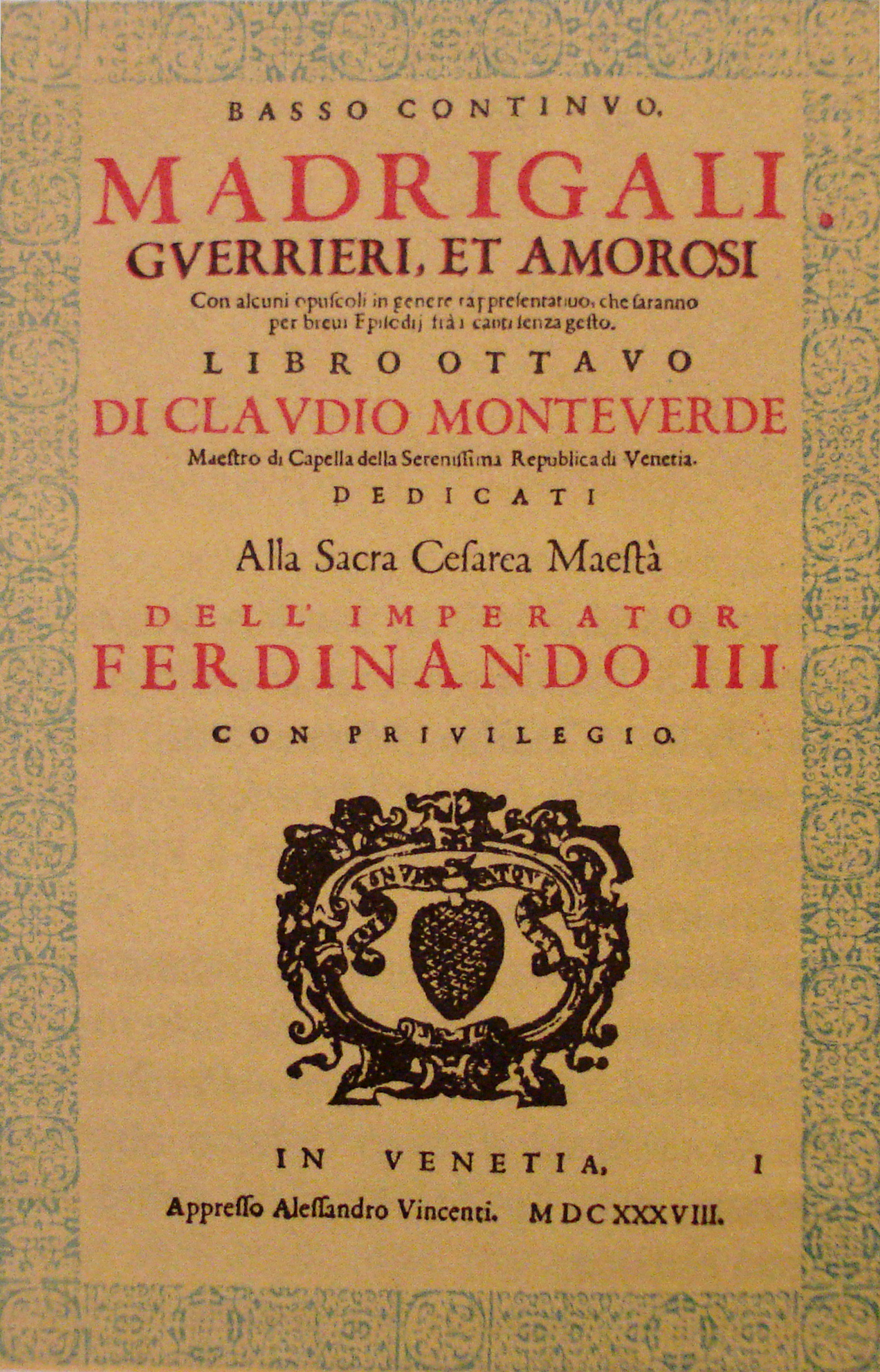 Capa do VIII livro de madrigais